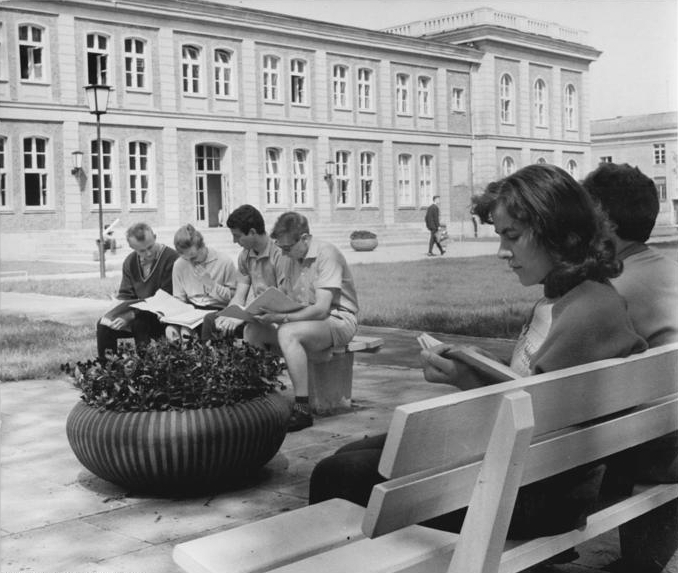 Zentralbild-Brüggmann Kl-Qu. 1.6.1961 Vor dem VI. Pädagogischen Kongreß Besuch in der Pädagogischen Hochschule Potsdam Lust und Liebe zum Lehrerberuf müssen die Studenten der Pädagogischen Hochschule mitbringen, um erfolgreich zu studieren. Zur Zeit werden im fünfjährigen Studium Lehrer für die Klassen 5 bis 12 ausgebildet, Lehrer für die zehnklassige polytechnische Oberschule legen nach vier Jahren Studium bereits ihre Staatsprüfung ab. Ausser einemfundierten pädagogischen Wissen beherrschen die Absolventen zwei Spezialfächer in den verschiedensten Kombinationen. Gegenwärtig studieren etwa 2000 junge Menschen an der Pädagogischen Hochschule Potsdam-Sanssouci, dazu kommen noch 2850 Fernstudenten. UBz.: "Repotitio unter studiorum" - das ist der Grundsatz der Studenten auch während längerer Vorlesungspausen. Im Hintergrund ein neues Institutsgebäude."